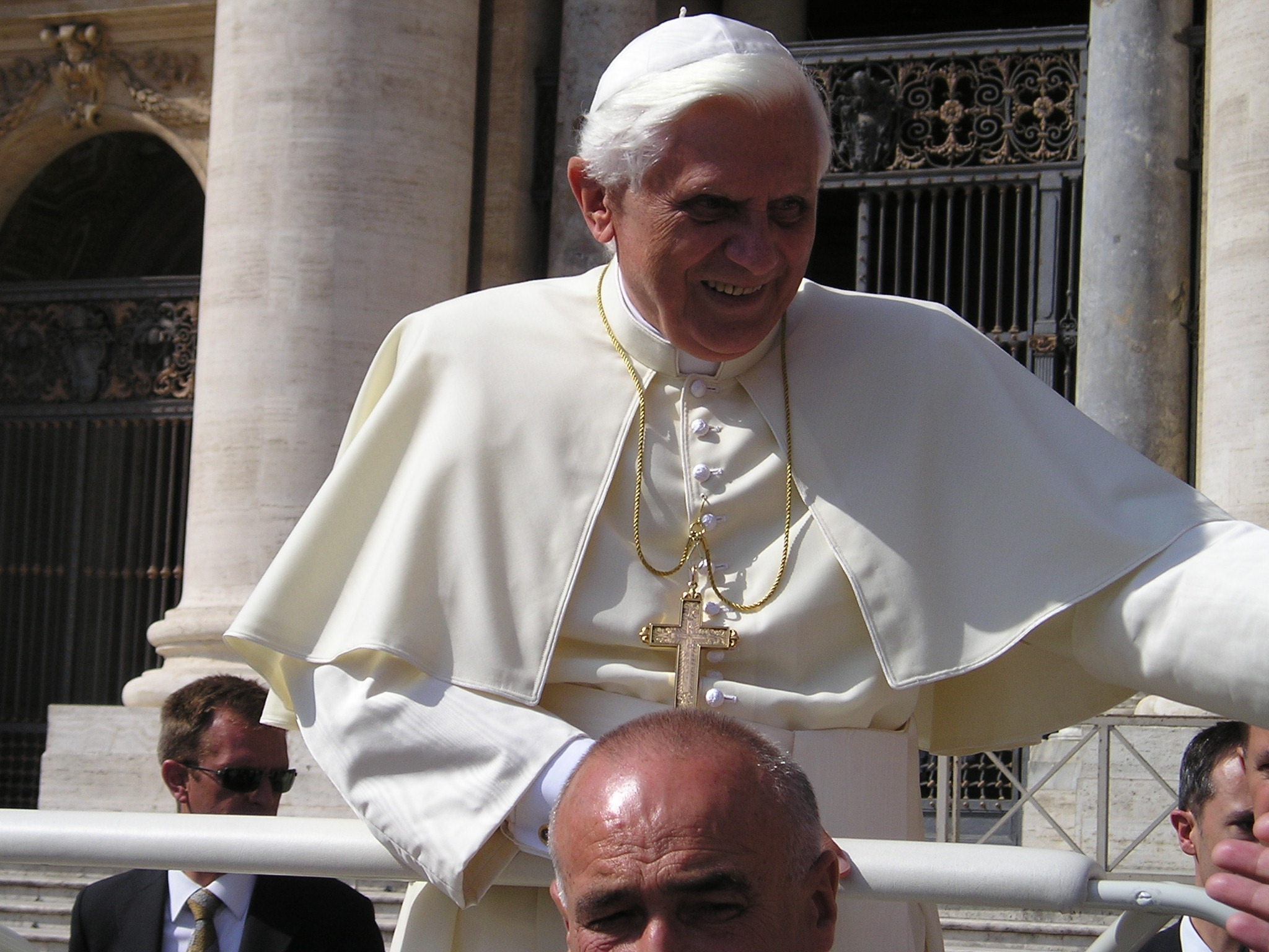 Foto di Papa Benedetto XVI al termine dell'udienza del 21 settembre 2005, autore Massimo Macconi